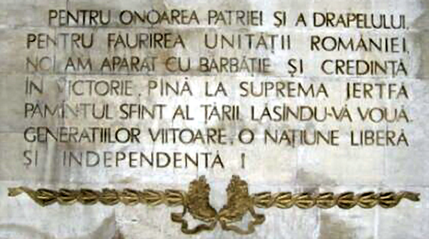 Inscripţie de pe Maosoleul de la Mateiaş în memoria celor care au lupta în bătălia din zona Bran-Campulung -1916 - Sursa - fotografie proprie